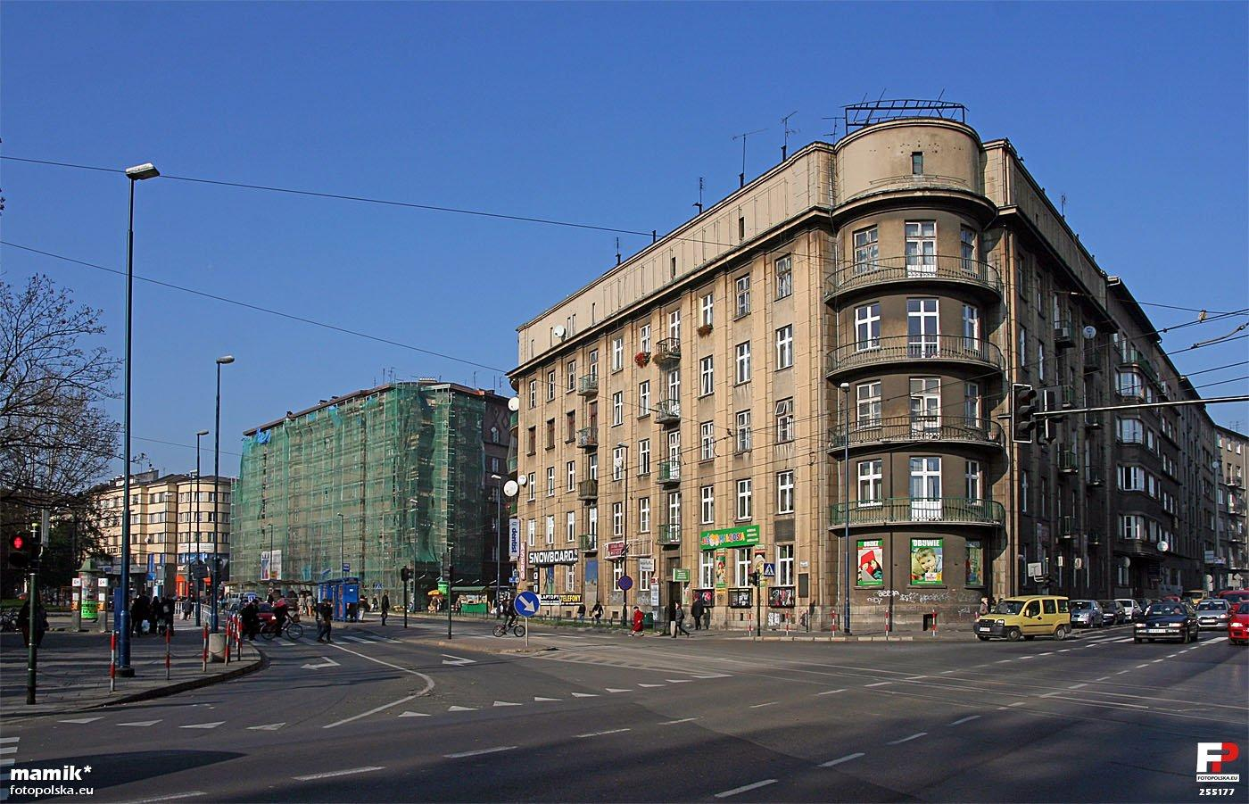 Plac Inwalidów, po prawej aleja Słowackiego